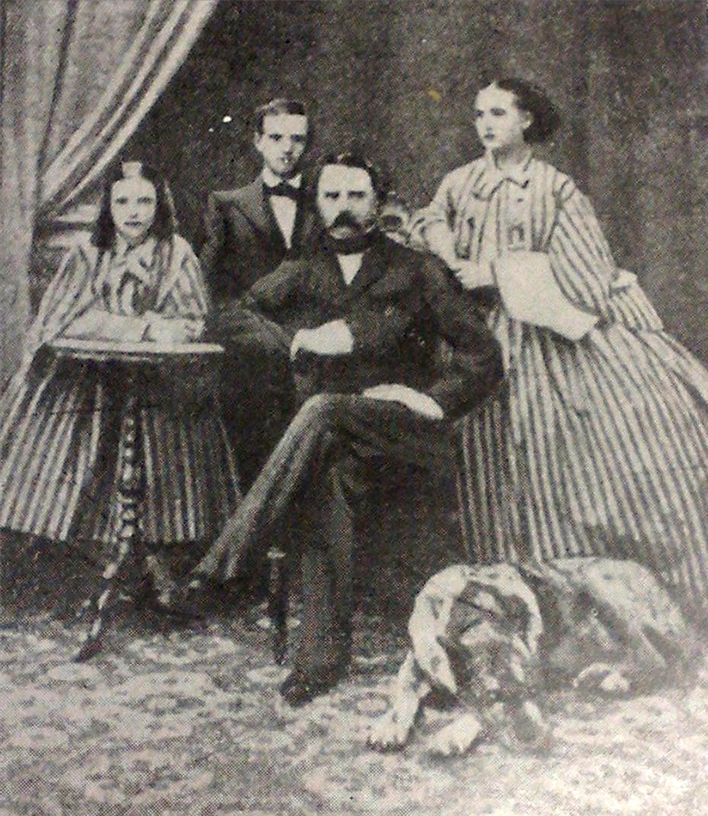 Fra venstre ses Prinsesse Dagmar (Kejserinde af Rusland), Prins Vilhelm (Konge af Grækenland) og Prinsesse Alexandra (Dronning af England). Siddende Kronprins Christian (Kong Christian IX) med kongens harlekin Grand Danois i 1861.